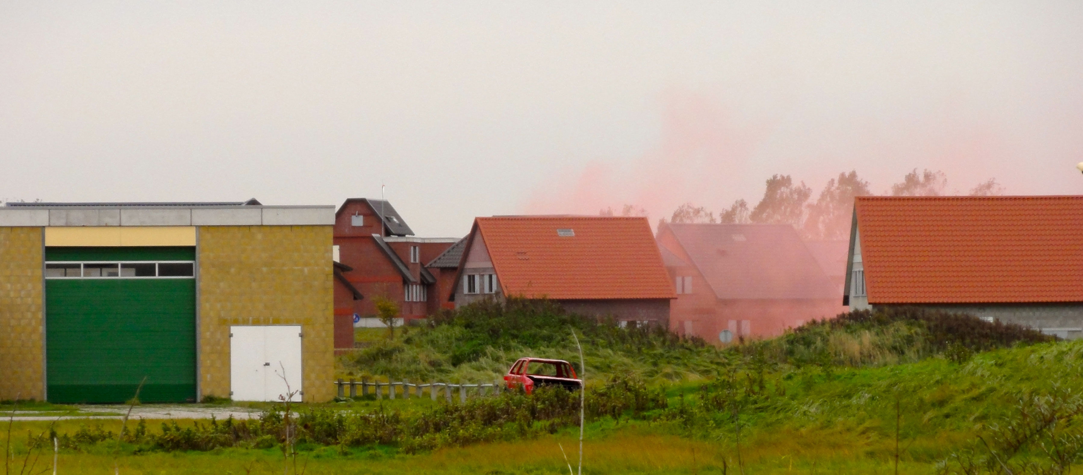 Het oefendorp Marnehuizen in de Marnerwaard